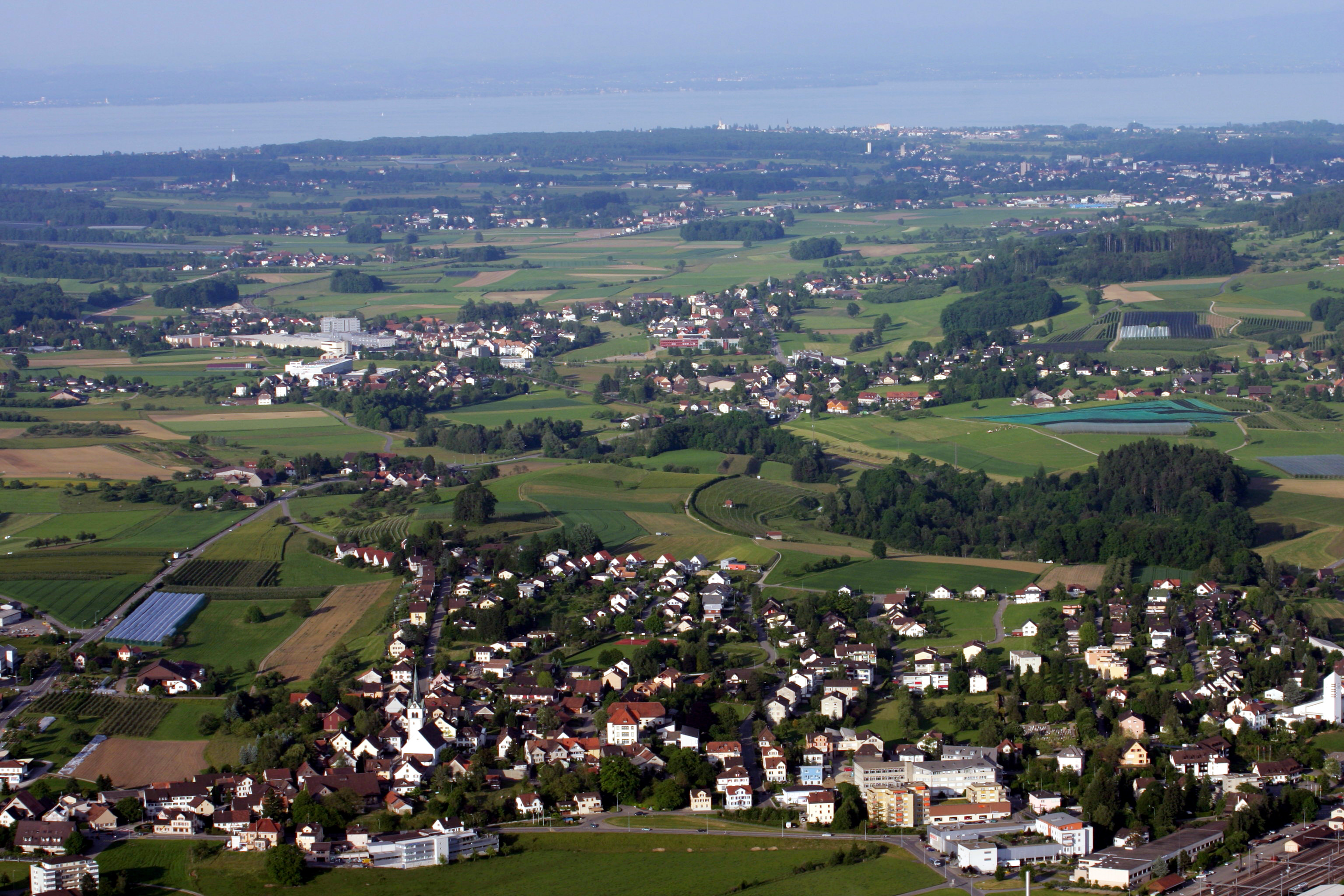 Sulgen im Vordergrund, Erlen in der Bildmitte und Romanshorn am Bodensee in der rechten Bildhälfte im Hintergrund - Kanton Thurgau, Schweiz